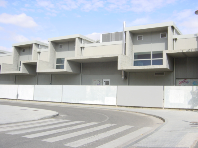 Centro Cívico del Barrio de Pajarillos, Valladolid